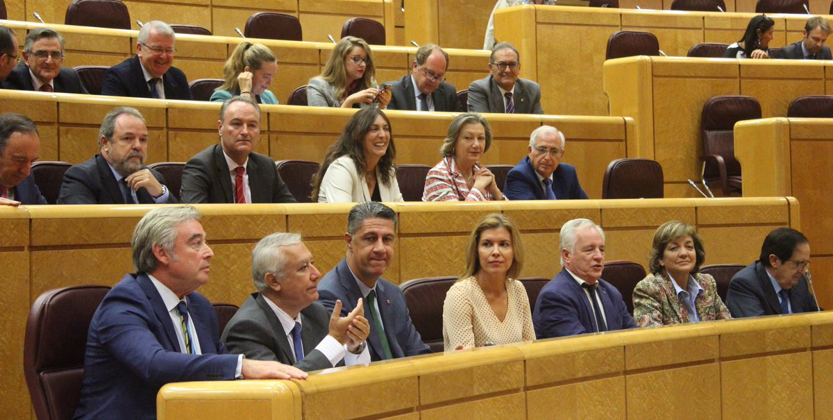 Juan José Imbroda nombrado vicepresidente de la Comisión Especial del Senado